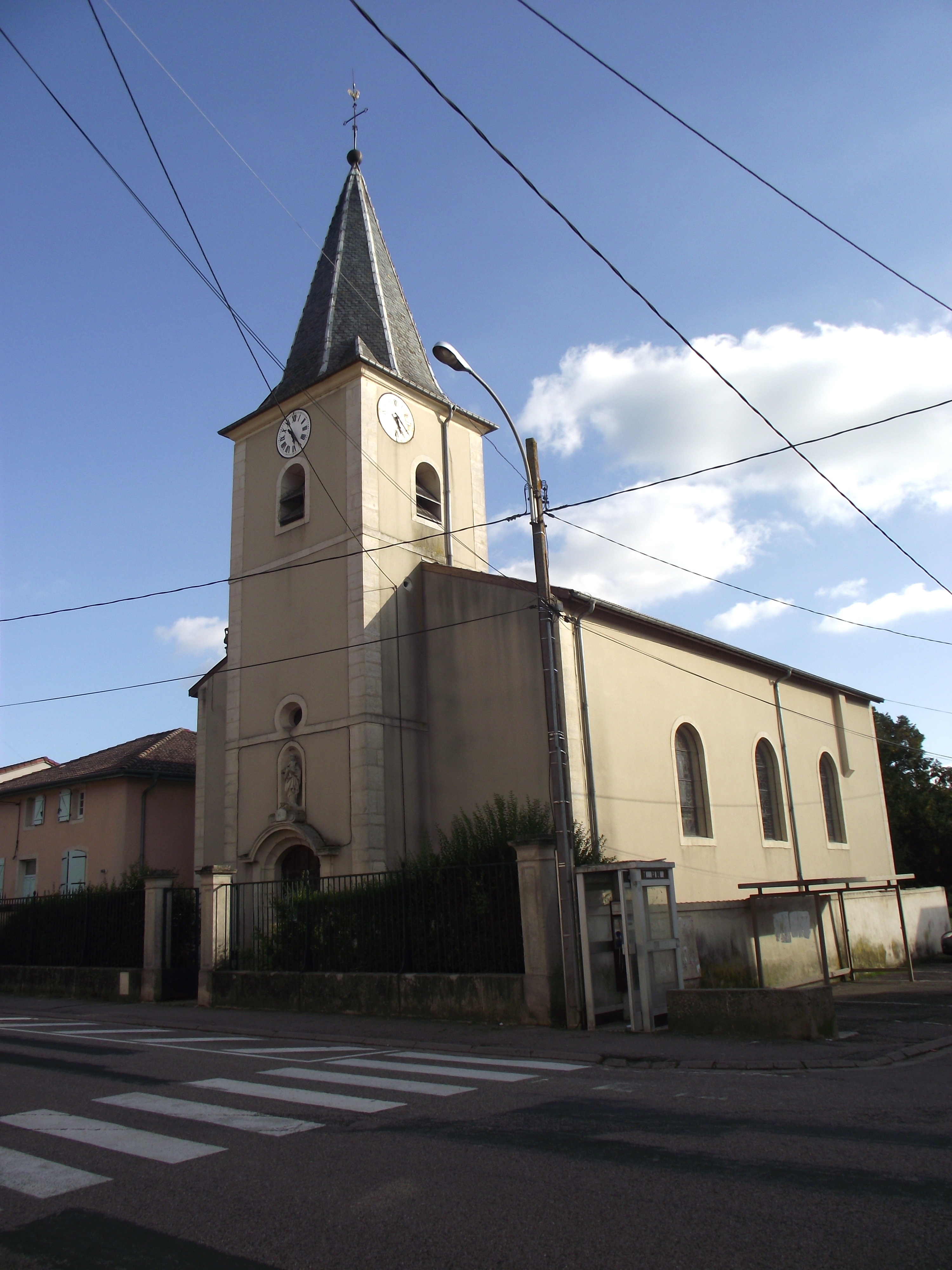 Église Saint-Martin de Bicqueley